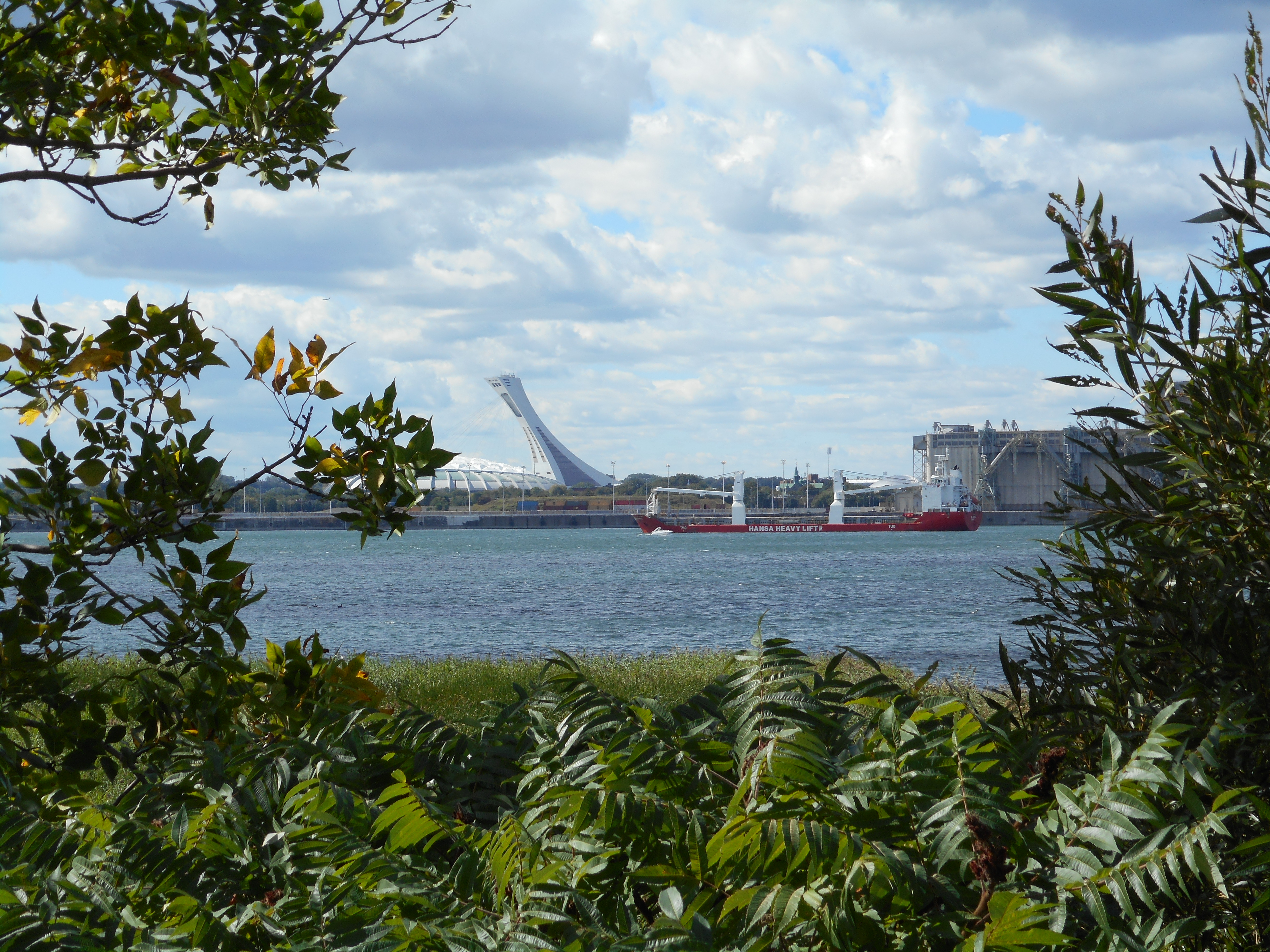 Parc Marie-Victorin, Longueuil Au loin, le stade olympique de Montréal